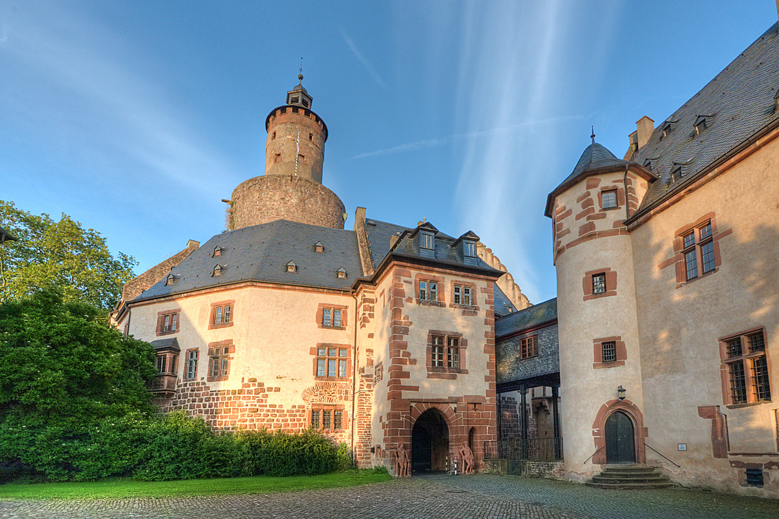 Das Schloss Büdingen - äußerer Schlosshof , Hessen, Deutschland.